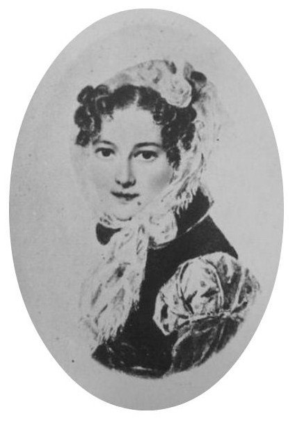 Елизавета Григорьевна Горсткина, ур. Ломоносова (ум. 1863), сестра товарища Пушкина — Сергея Ломоносова, жена декабриста И. Н. Горсткина.